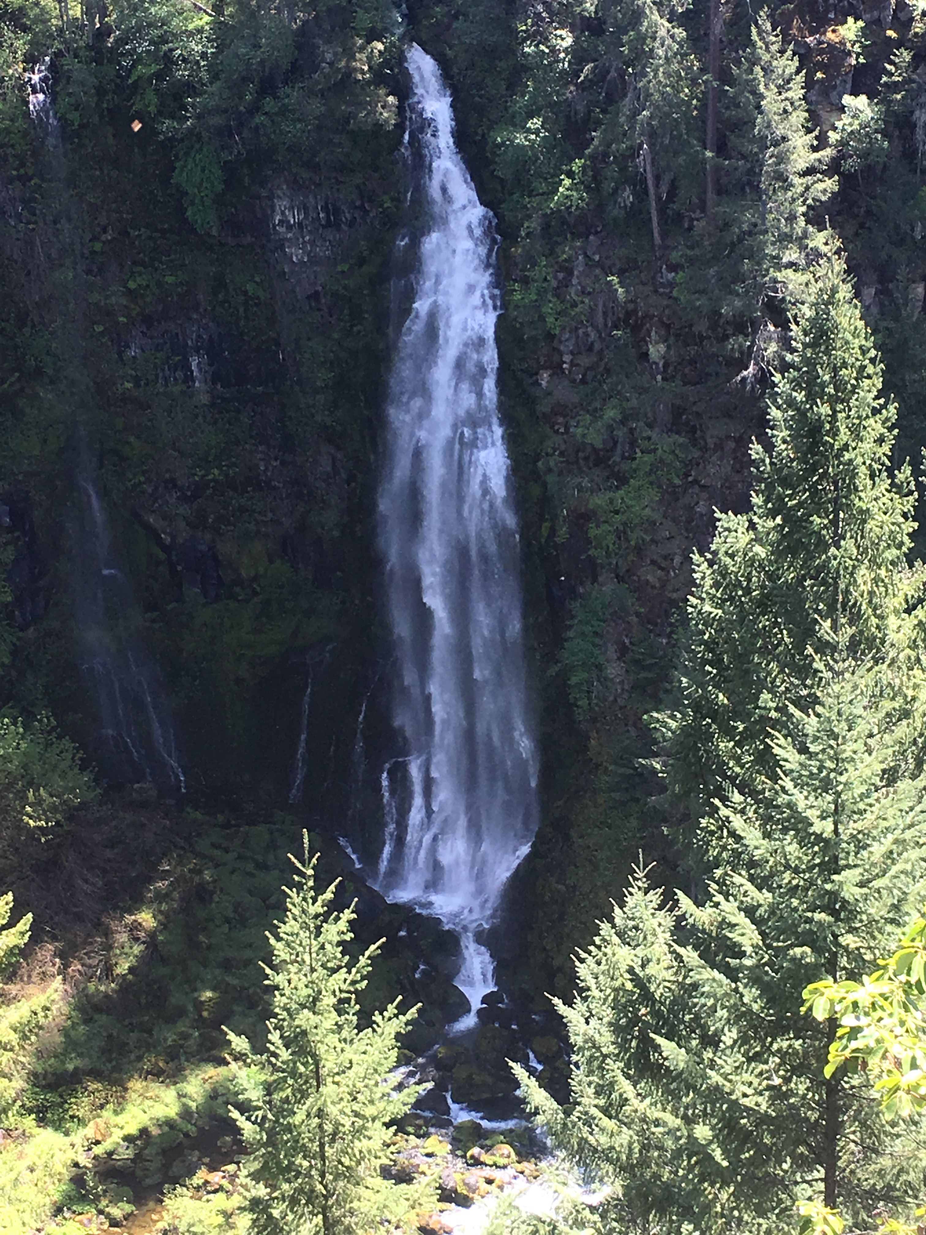 Barr creek falls, or